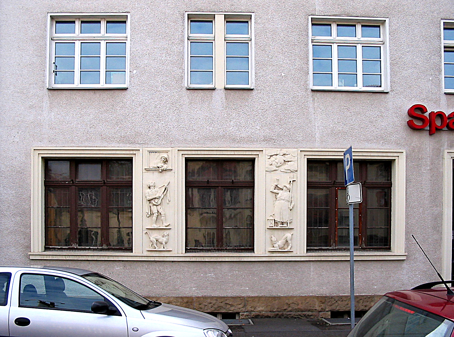 Radebeul, Genreszenen von Burkhart Ebe in der Hermann-Ilgen-Straße 28